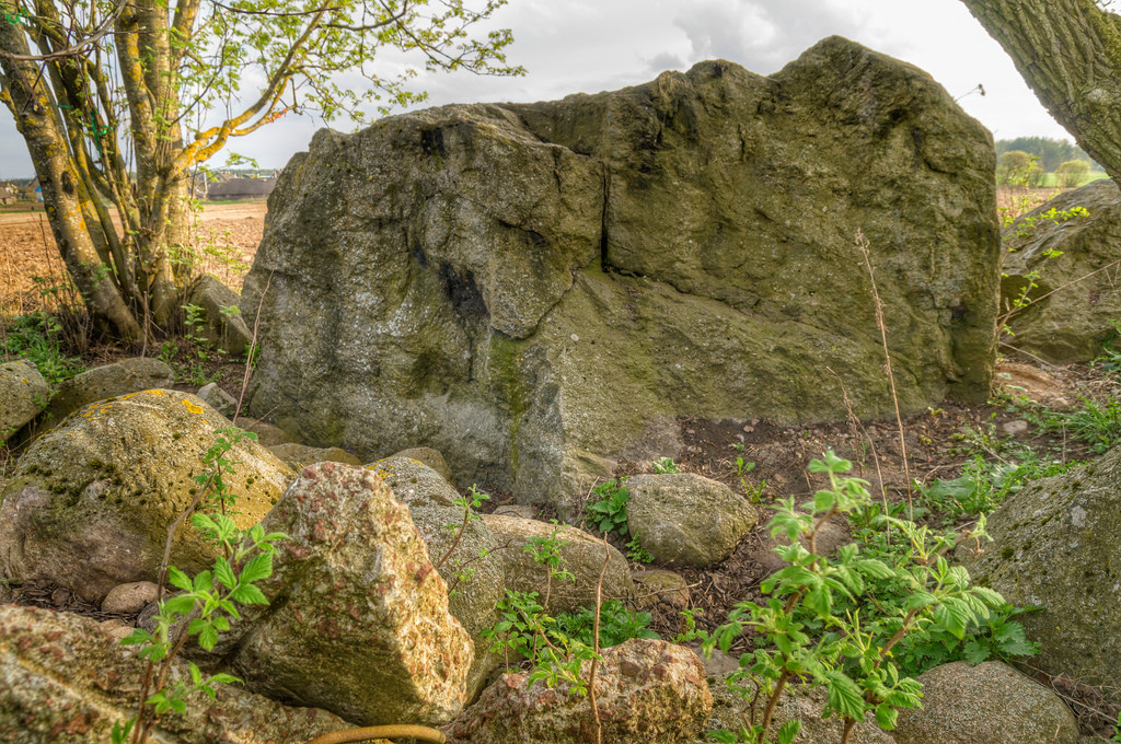 «Гомсін камень» куранецкі